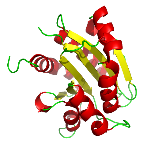 Structure of integrin alfa M 1 domain.